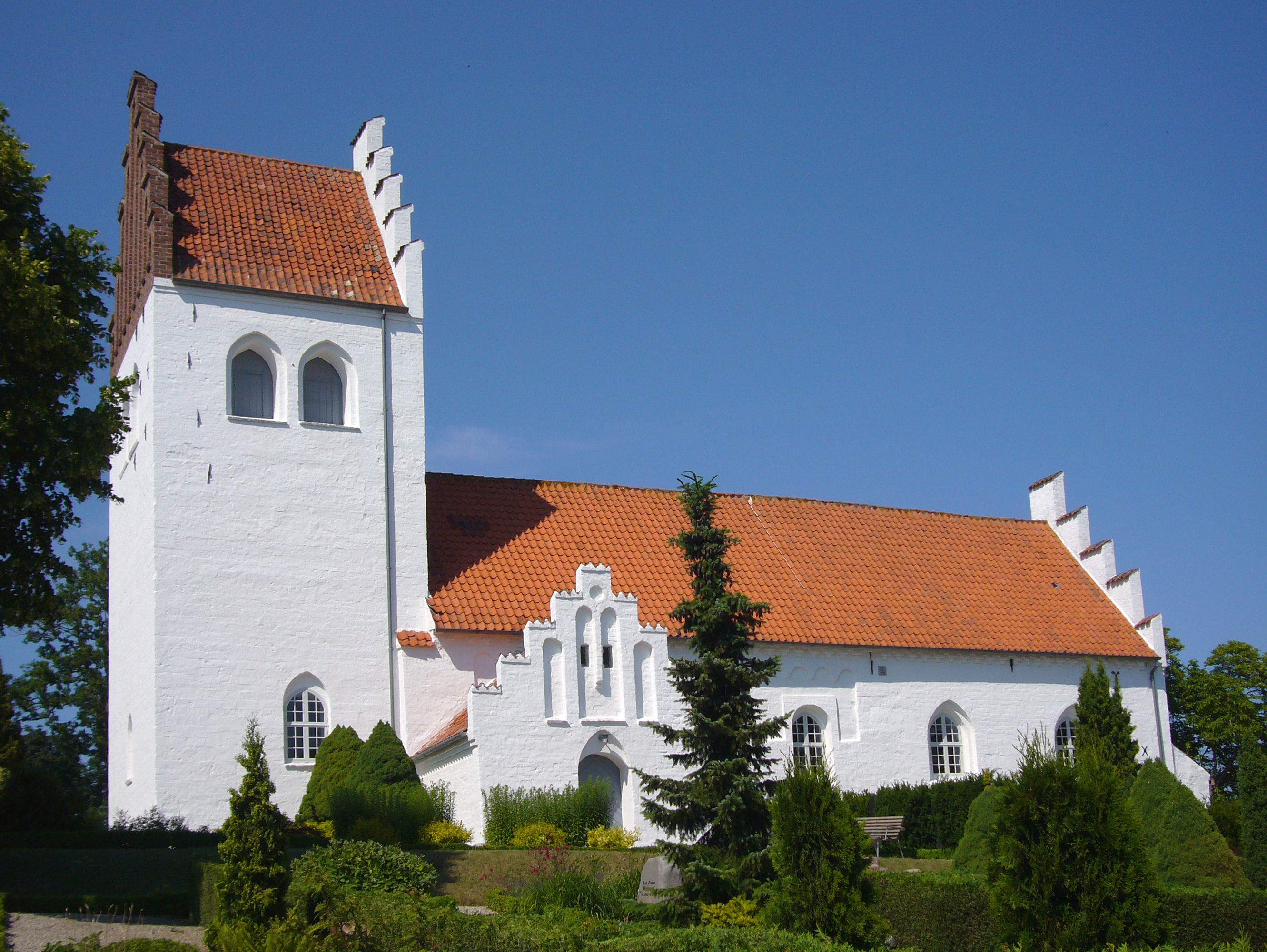 Snoldelev Kirke, Roskilde County, Denmark.